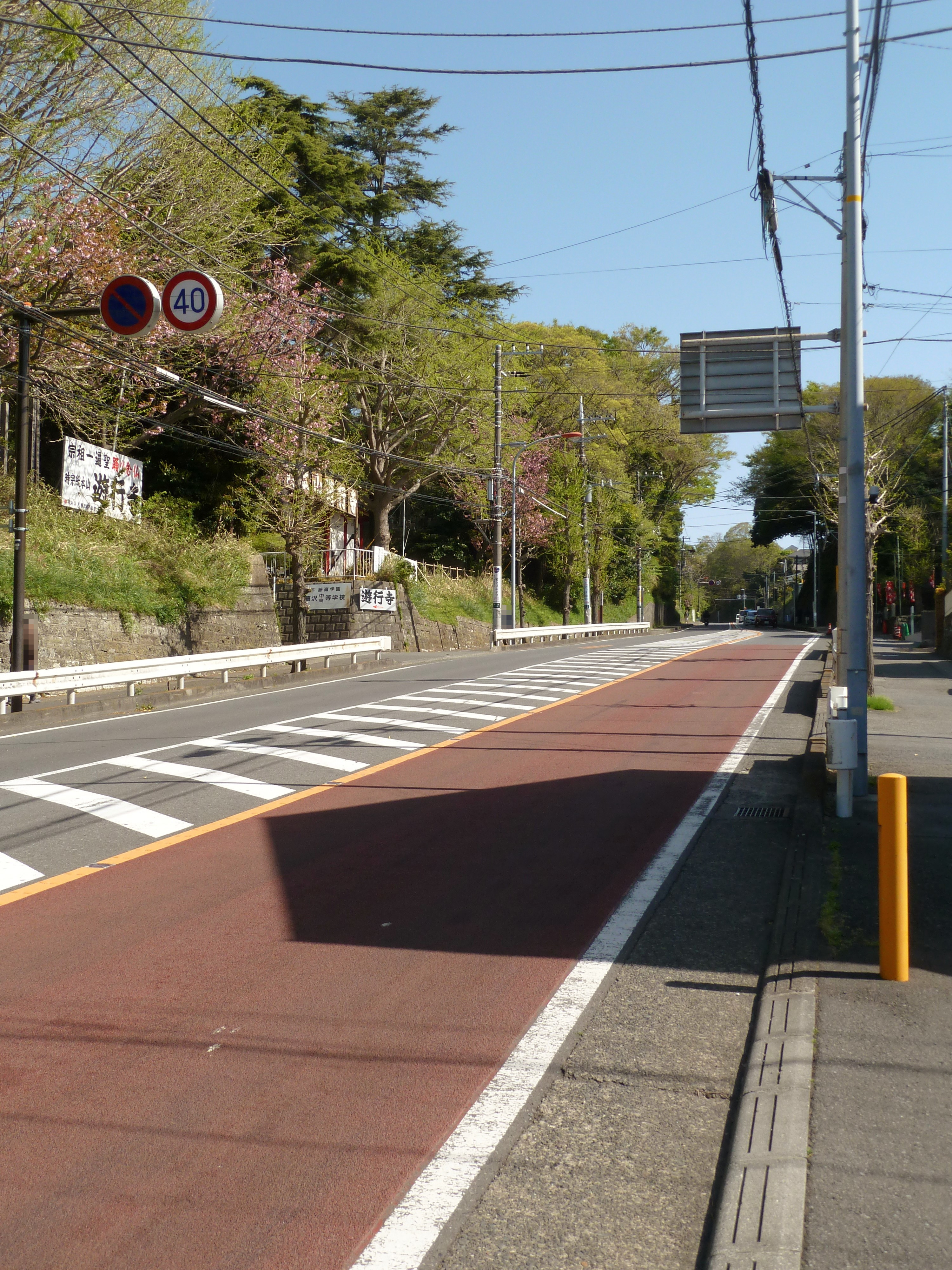 県道30号の遊行寺坂(神奈川県藤沢市)